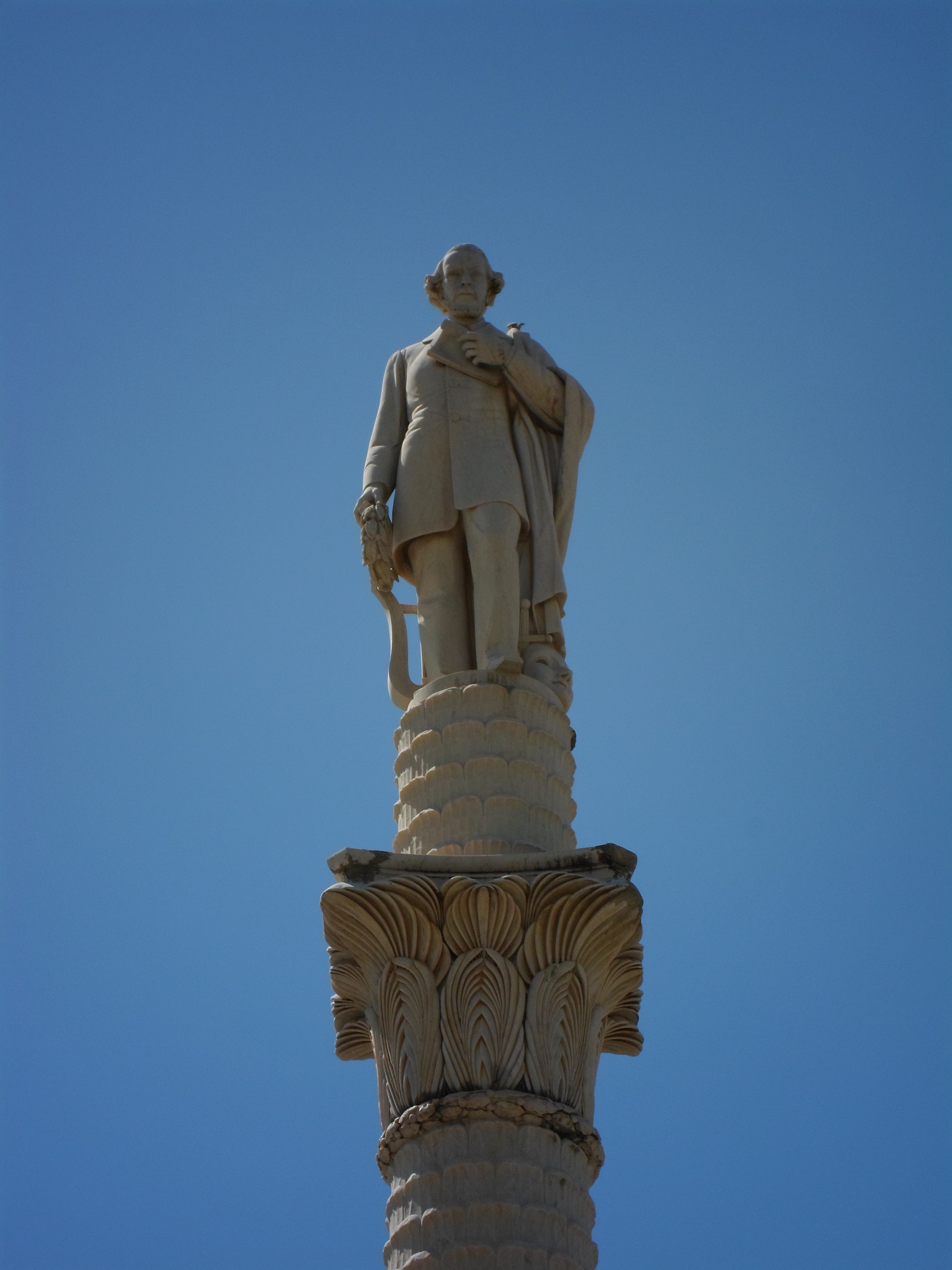 Monumento em homenagem a Gonçalves Dias na praça de mesmo nome, em São Luís.